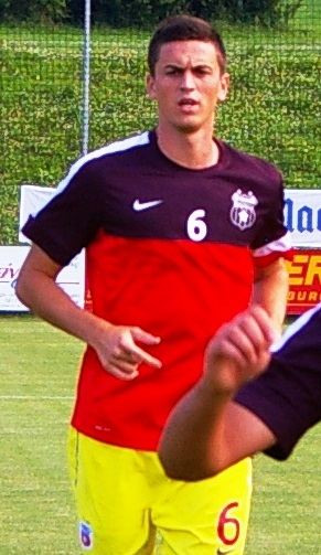 Florin Gardos ist eine Spieler von Steaua Bukarest